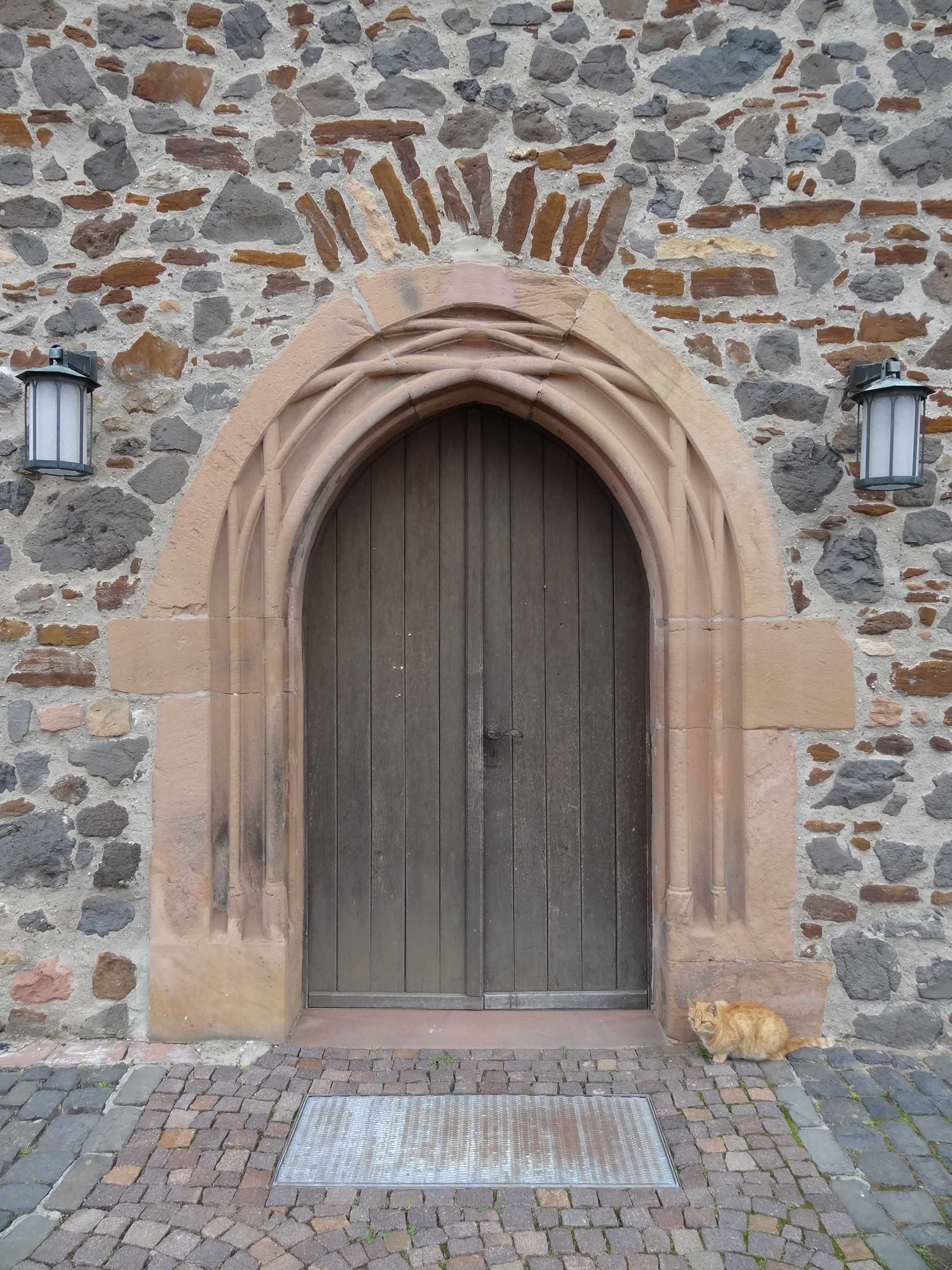 Evangelische Kirche Wieseck